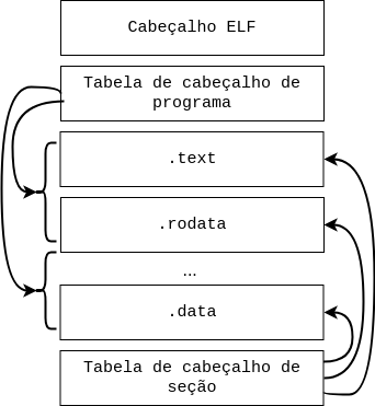 Leiaute ELF